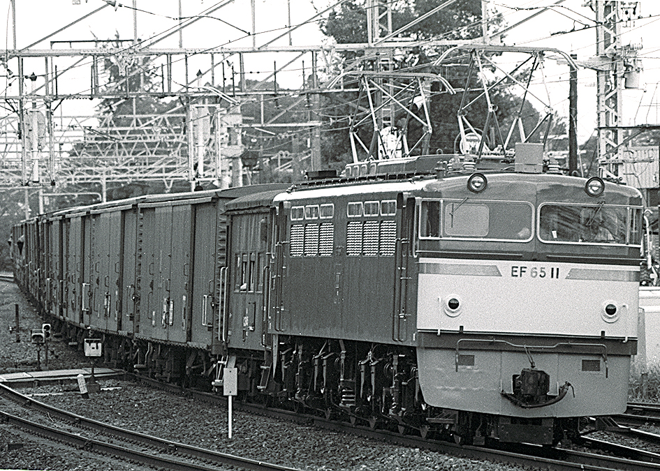 国鉄 EF65 11けん引貨物列車